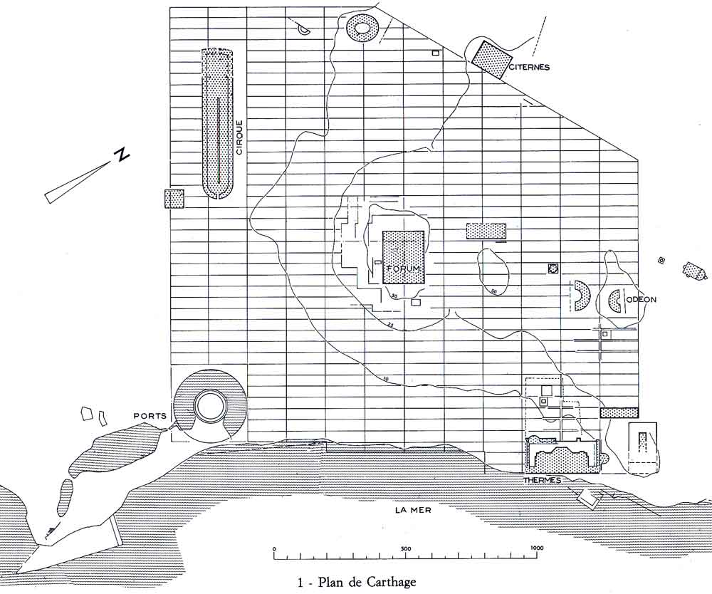 Carthage, ville romaine - Plan d'ensemble Collection particulière Bertrand Bouret